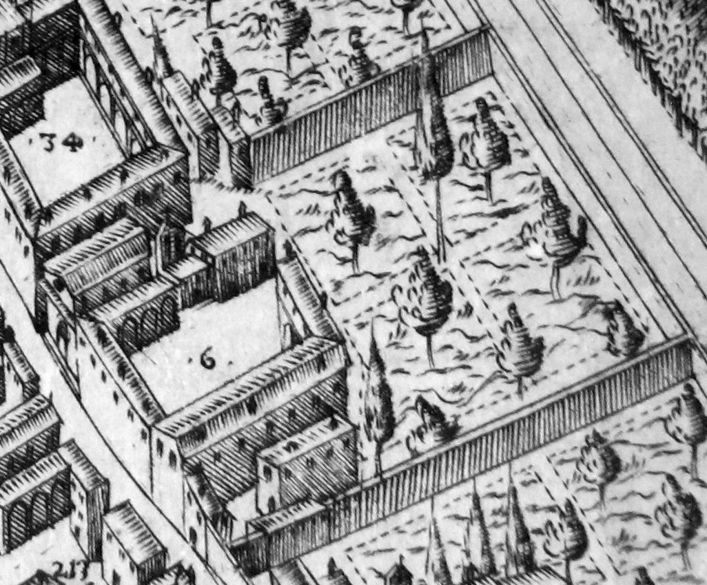 Pianta del buonsignori, dettaglio 006 sant'agata monastero